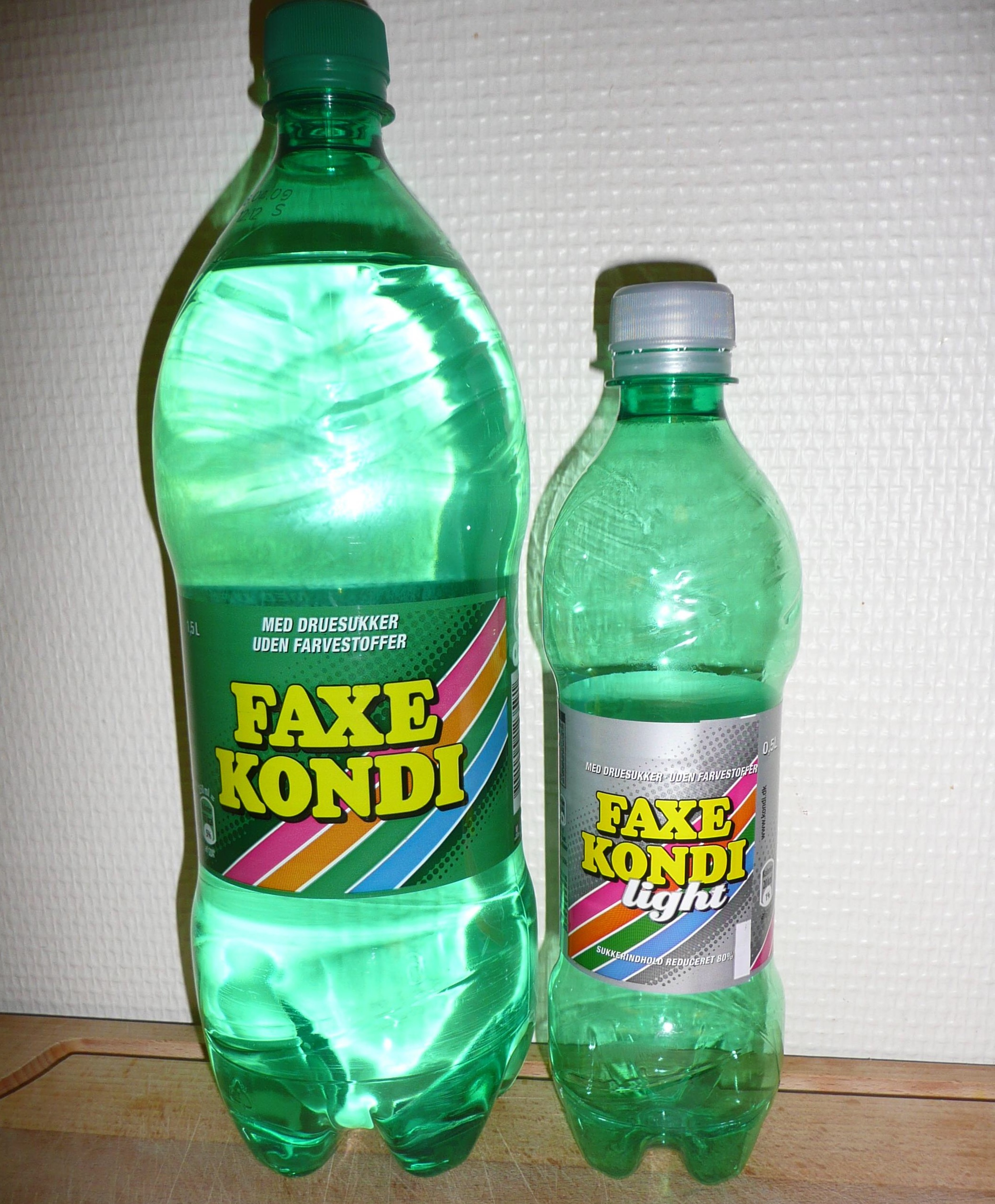 Faxe Kondi og Faxe Kondi Light